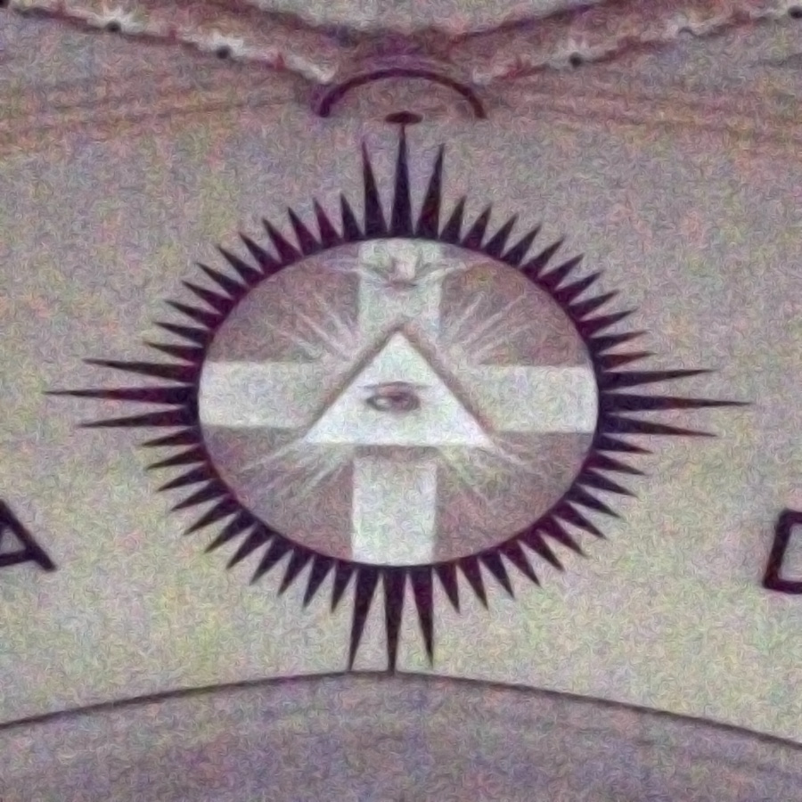 Igreja Sagrada Família em Porto Alegre